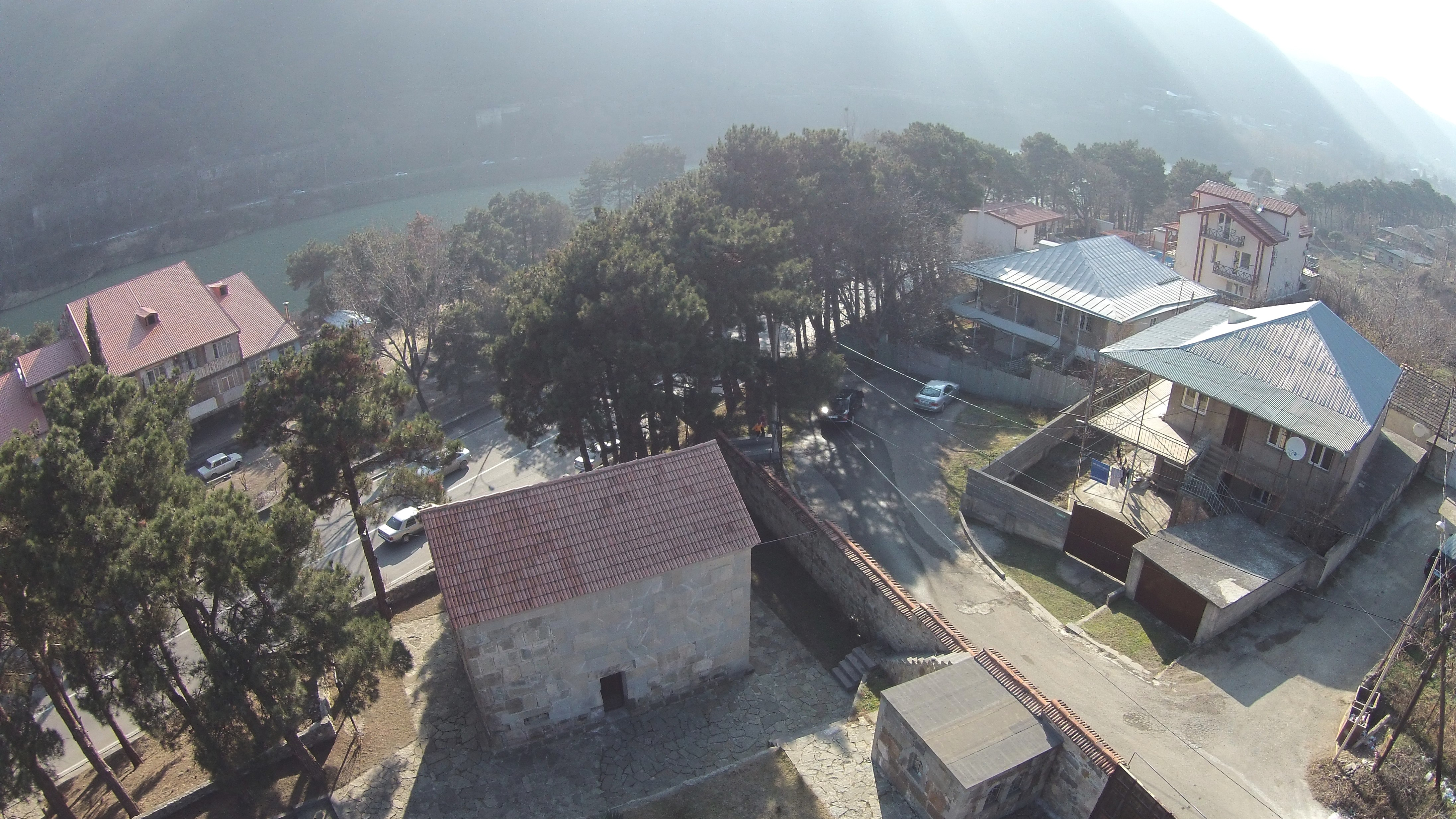 გეთსამანიის ეკლესია, მცხეთა.